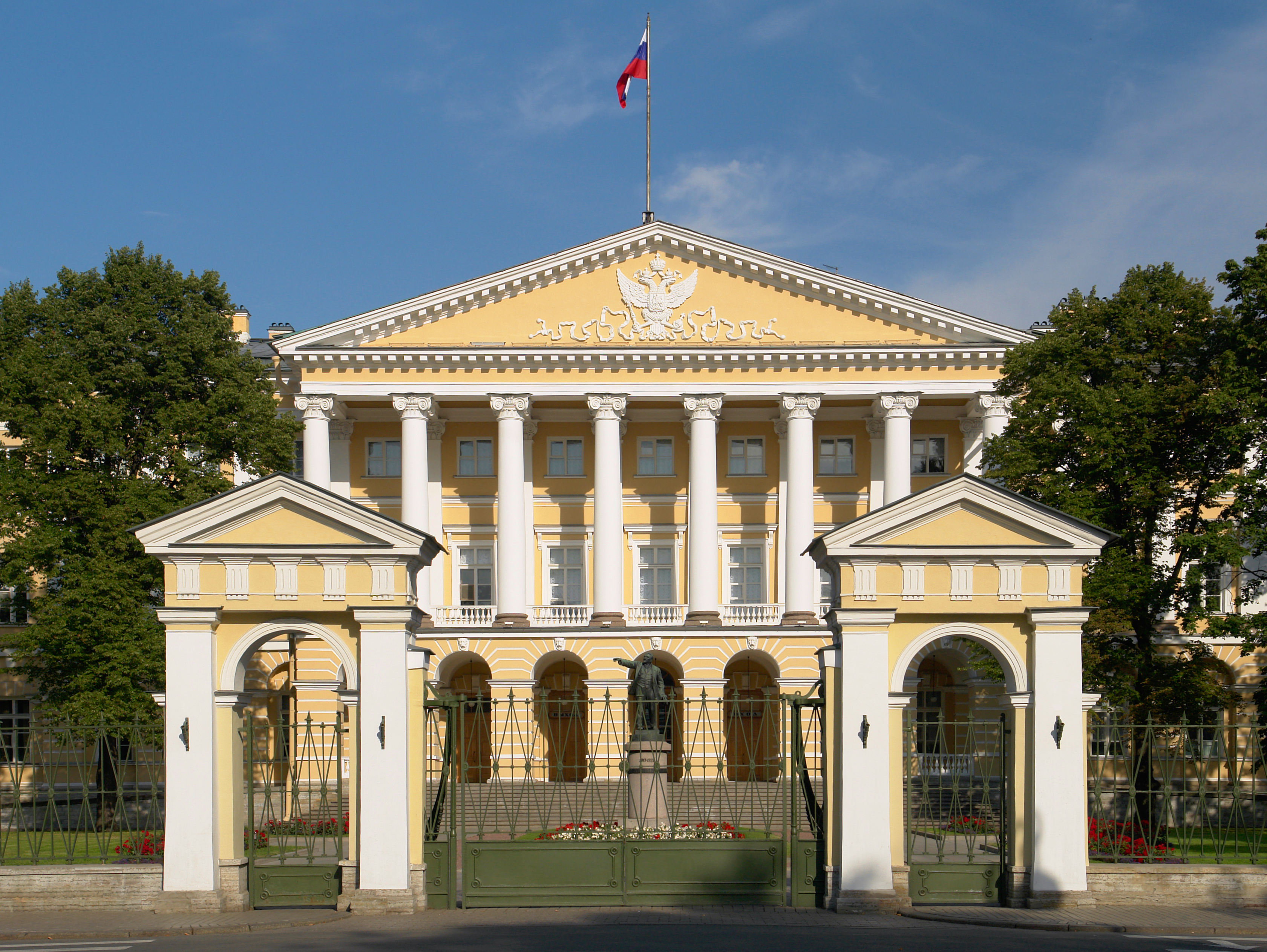 Смольный институт, Санкт-Петербург.